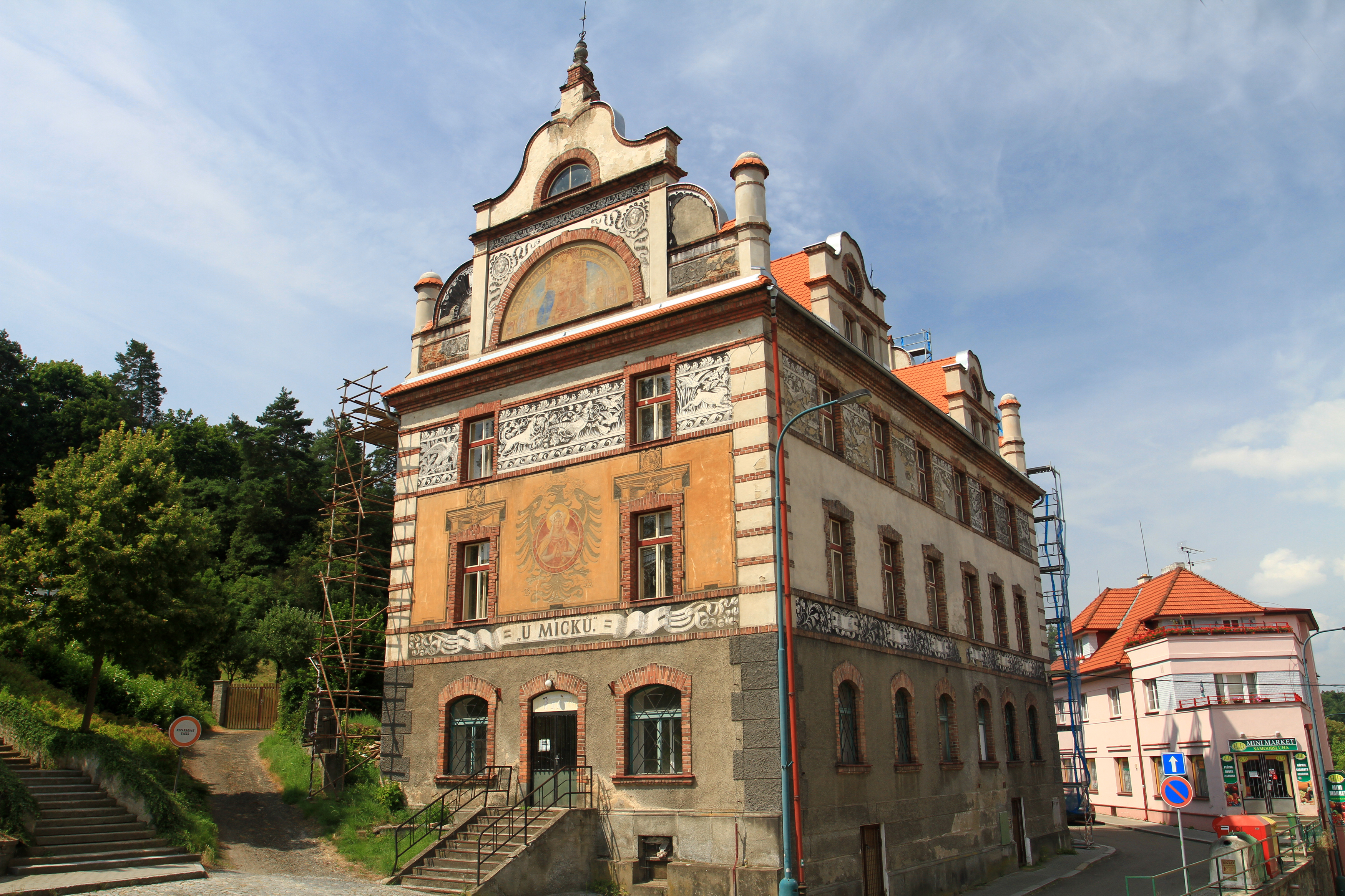 Měšťanský dům U Micků (Týnec nad Sázavou), Klusáčkova 5, Týnec nad Sázavou